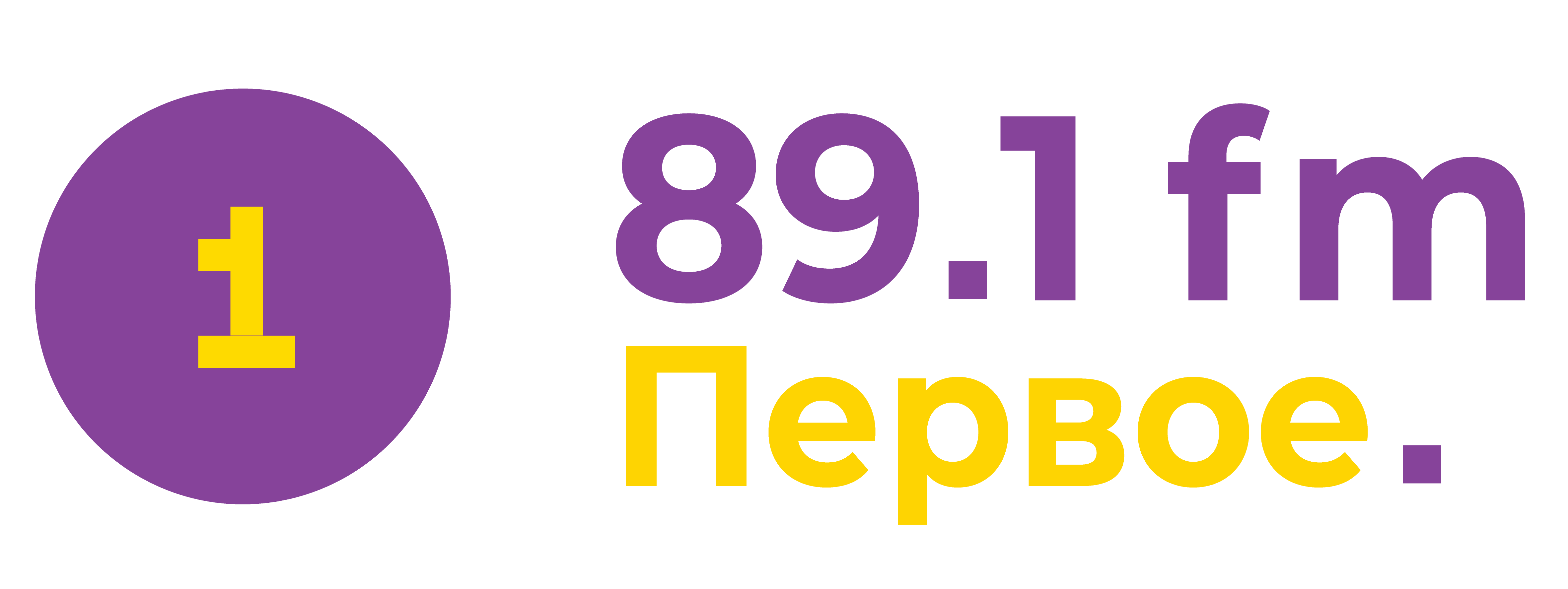 Логотип Первого радио 89.1fm